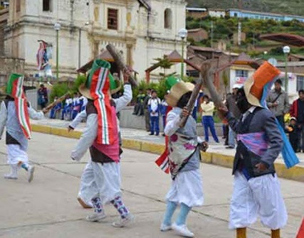 es la lucha entre cristianos y moros